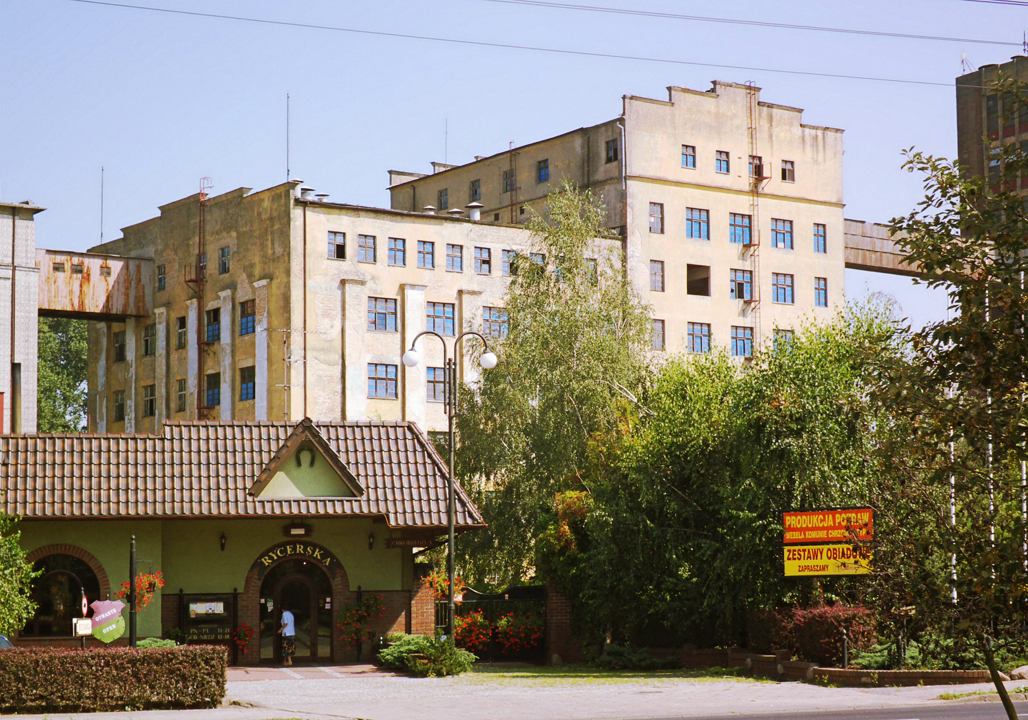 Szamotuły, młyn przemysłowy braci Körpel, cegła otynkowana, 1927